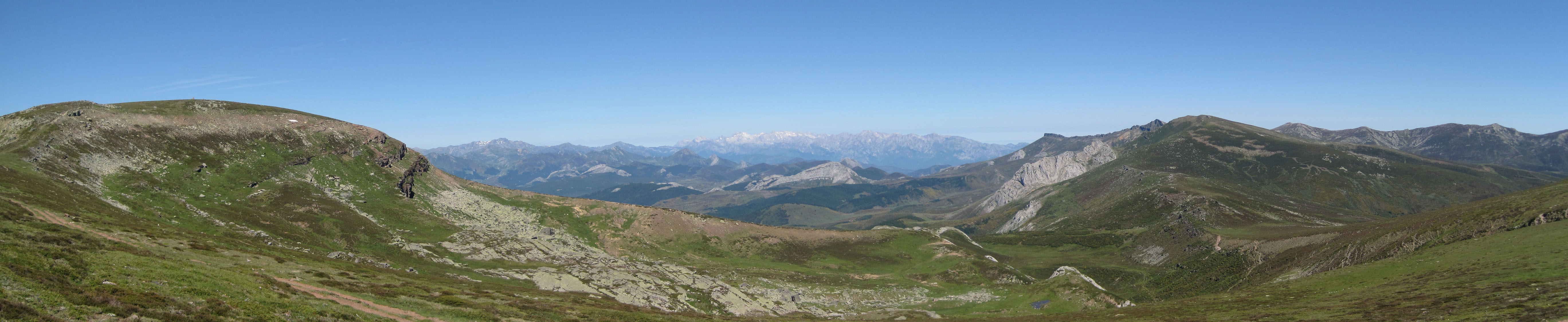 Vista del circo glaciar de Covarrés, a los pies del pico Valdecebollas (Palencia, España).